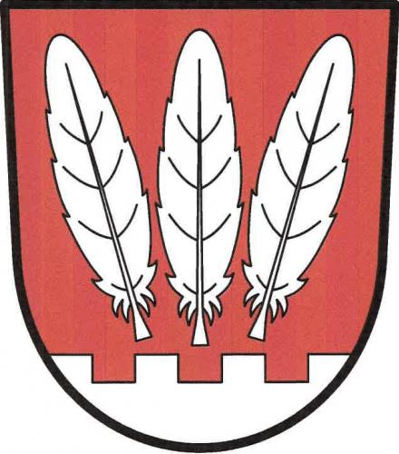 Pyšel znak